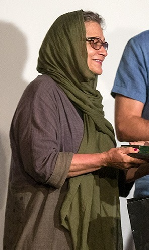 هنگامه گلستان در نخستین دوره اهدای نشان عکاس سال مطبوعاتی ایران